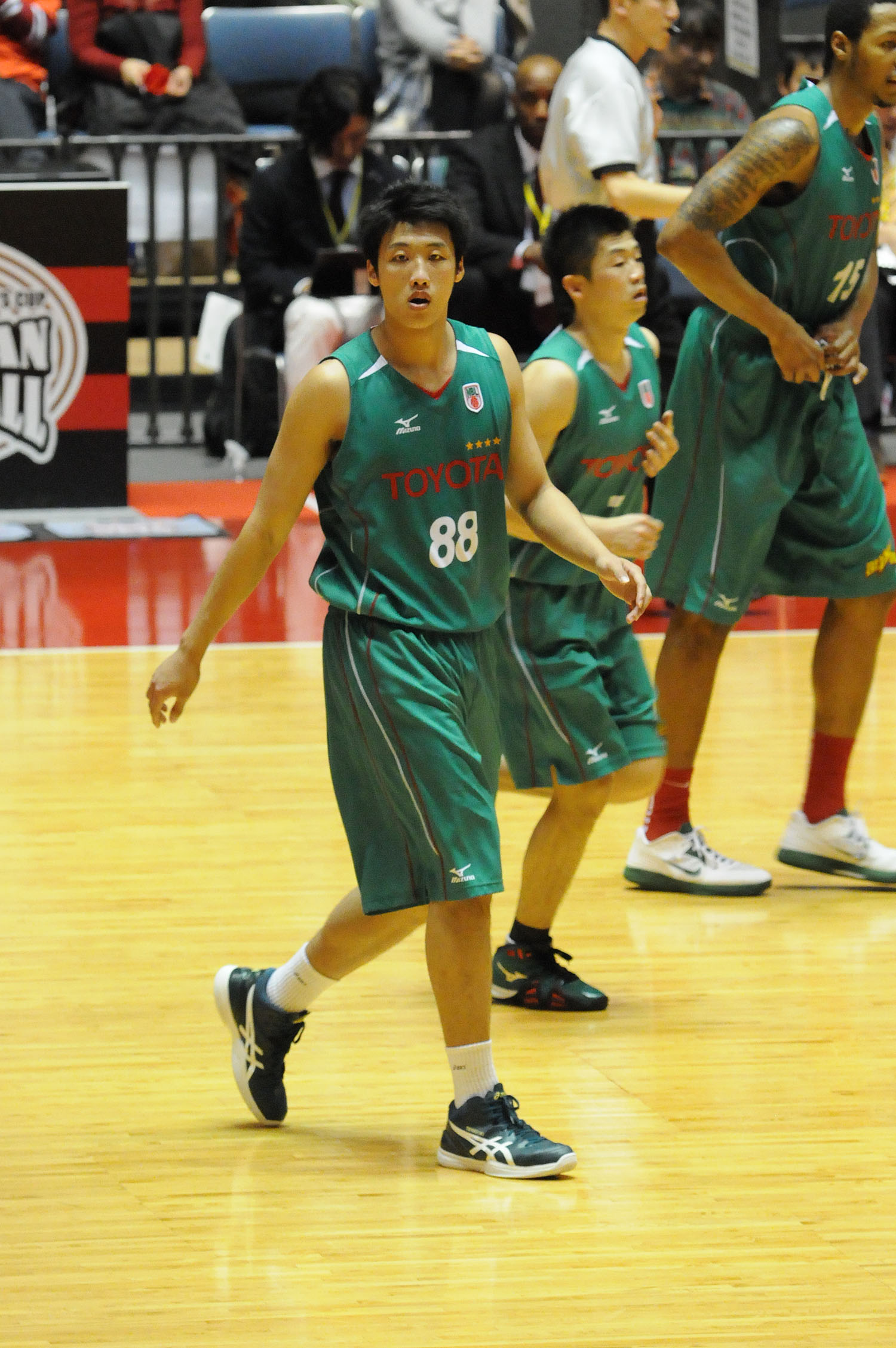 トヨタ自動車アルバルク、張本天傑選手。代々木第一体育館で。